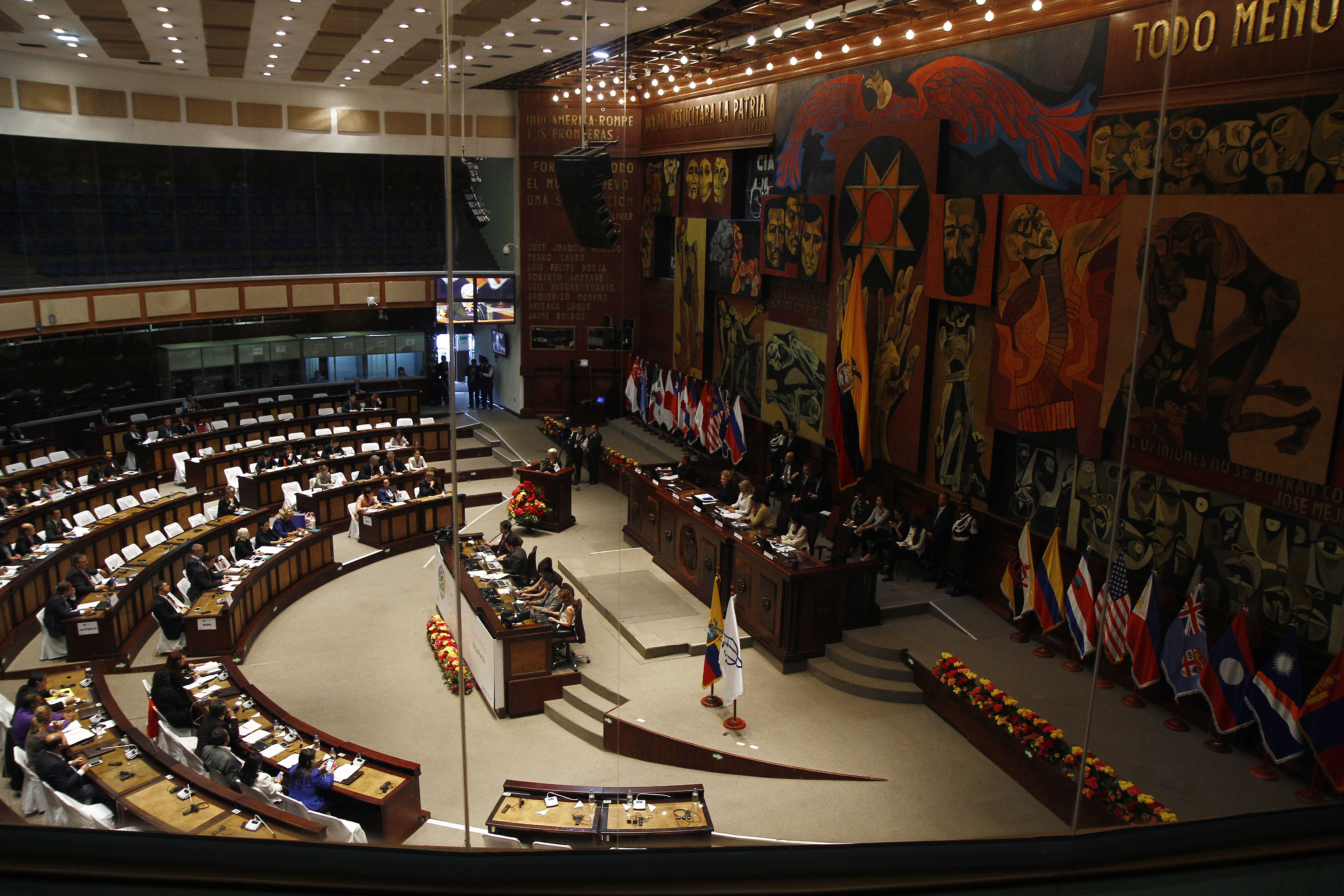 23 PARLAMENRO ASIA PACIFICO ECUADOR 2015